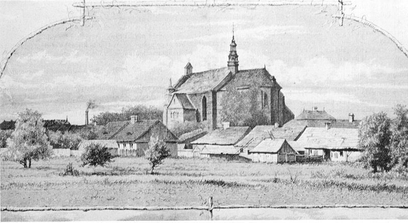 Proszowice - panorama miasta od pd-wsch.